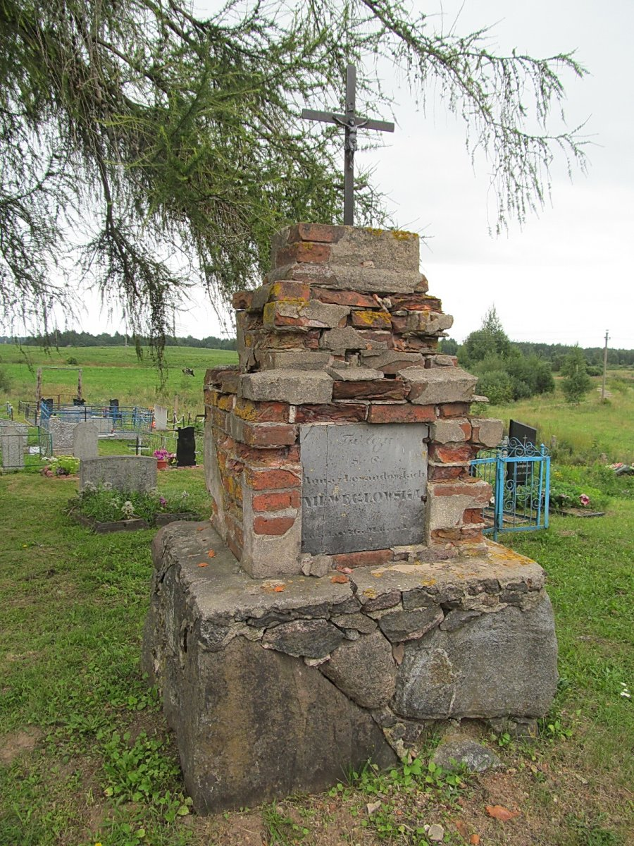 Дзедзіна (Мёрскі раён). Могілкі